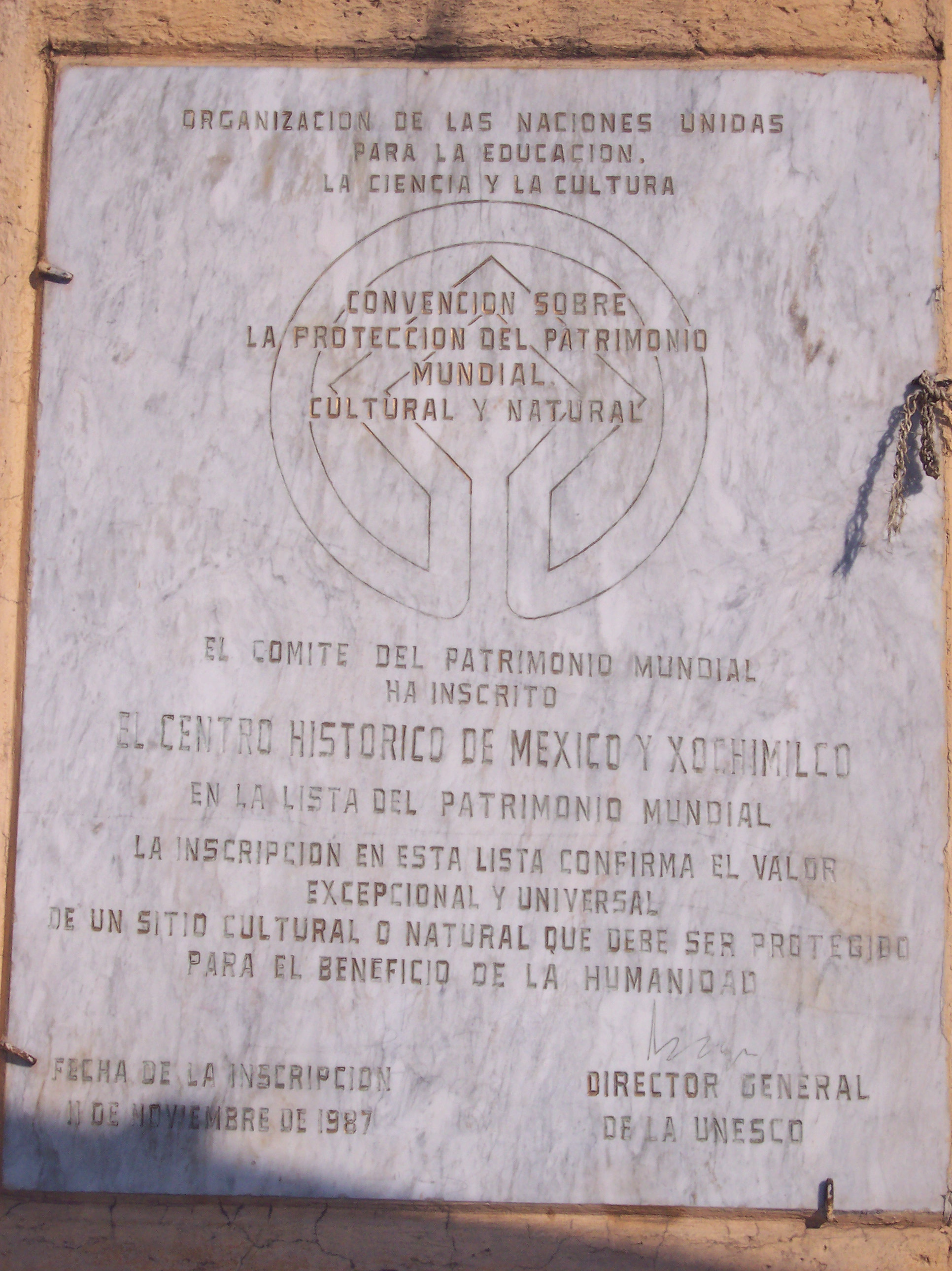 Photo taken in Xochimilco, D. F. Mexico. SPANISH: Fotos tomadas en Xochimilco.